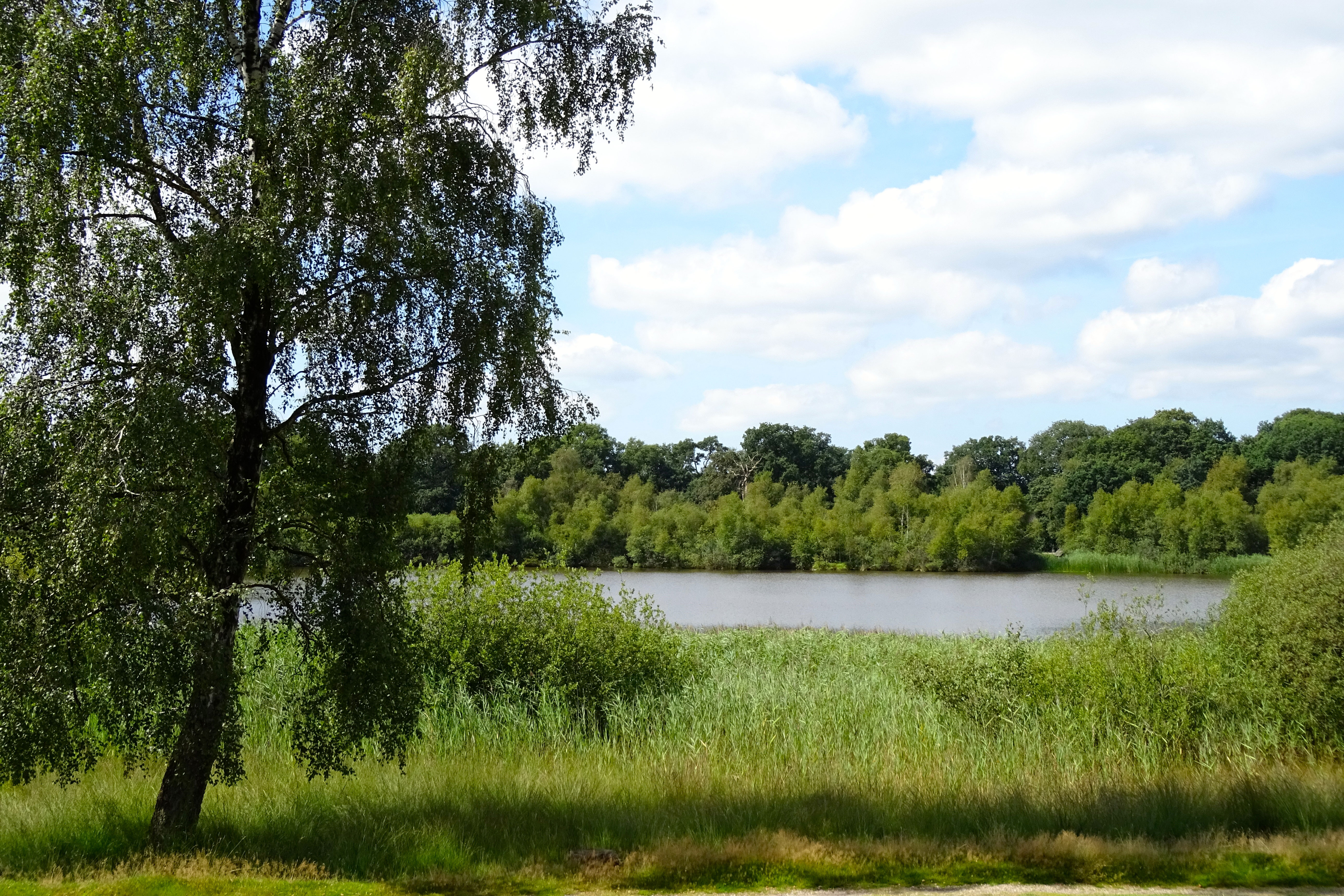 Het Uddelermeer gezien vanuit het oosten